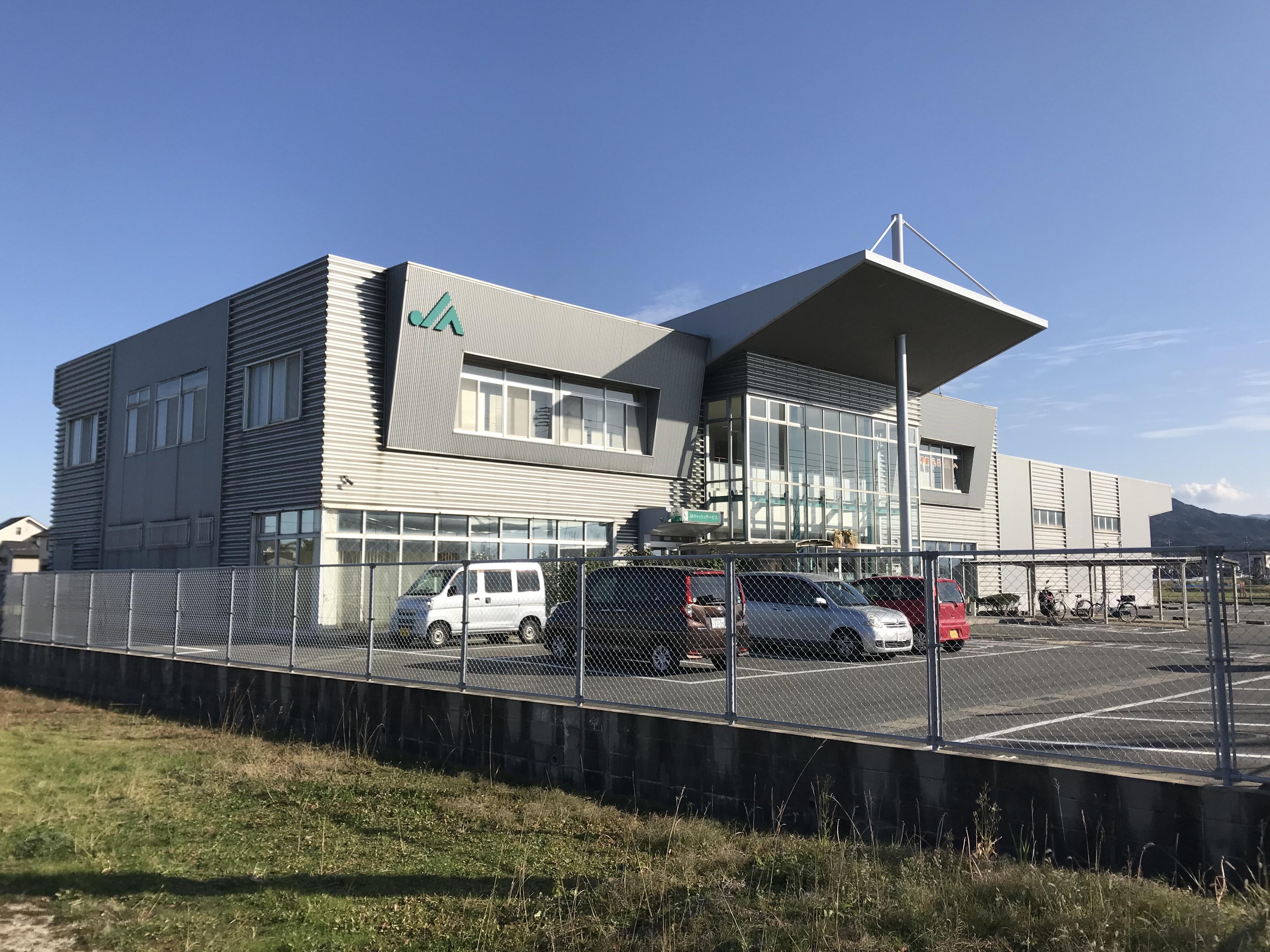 福岡市農業協同組合元岡支店